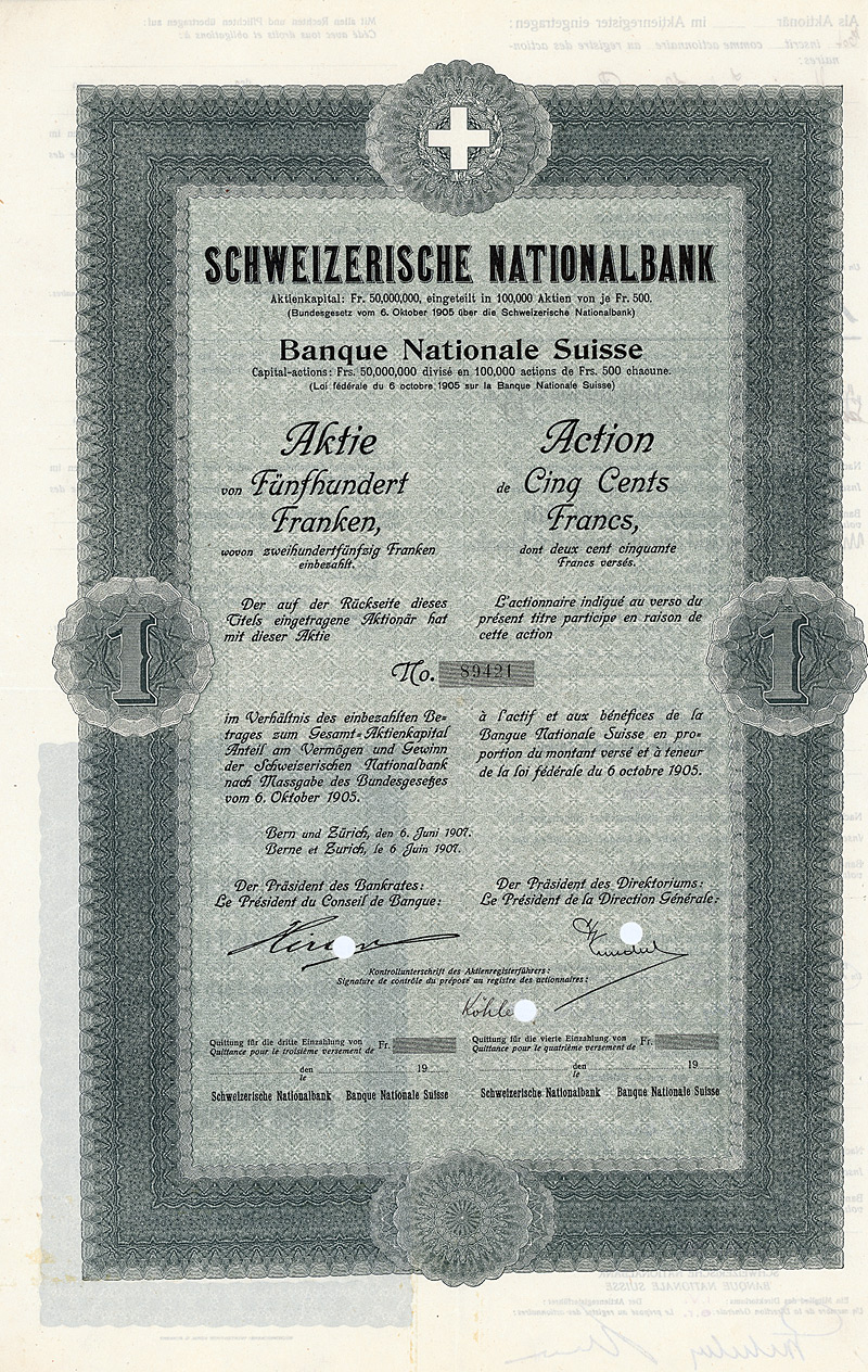 Aktie über 500 Franken der Schweizerischen Nationalbank vom 6. Juni 1907